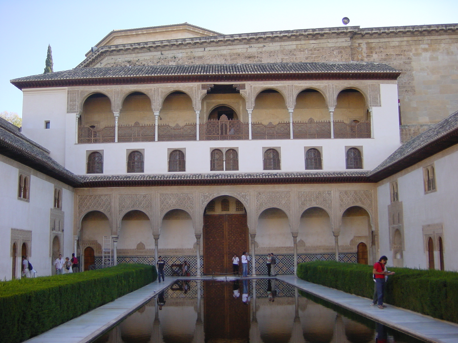 Alhambra de Granada